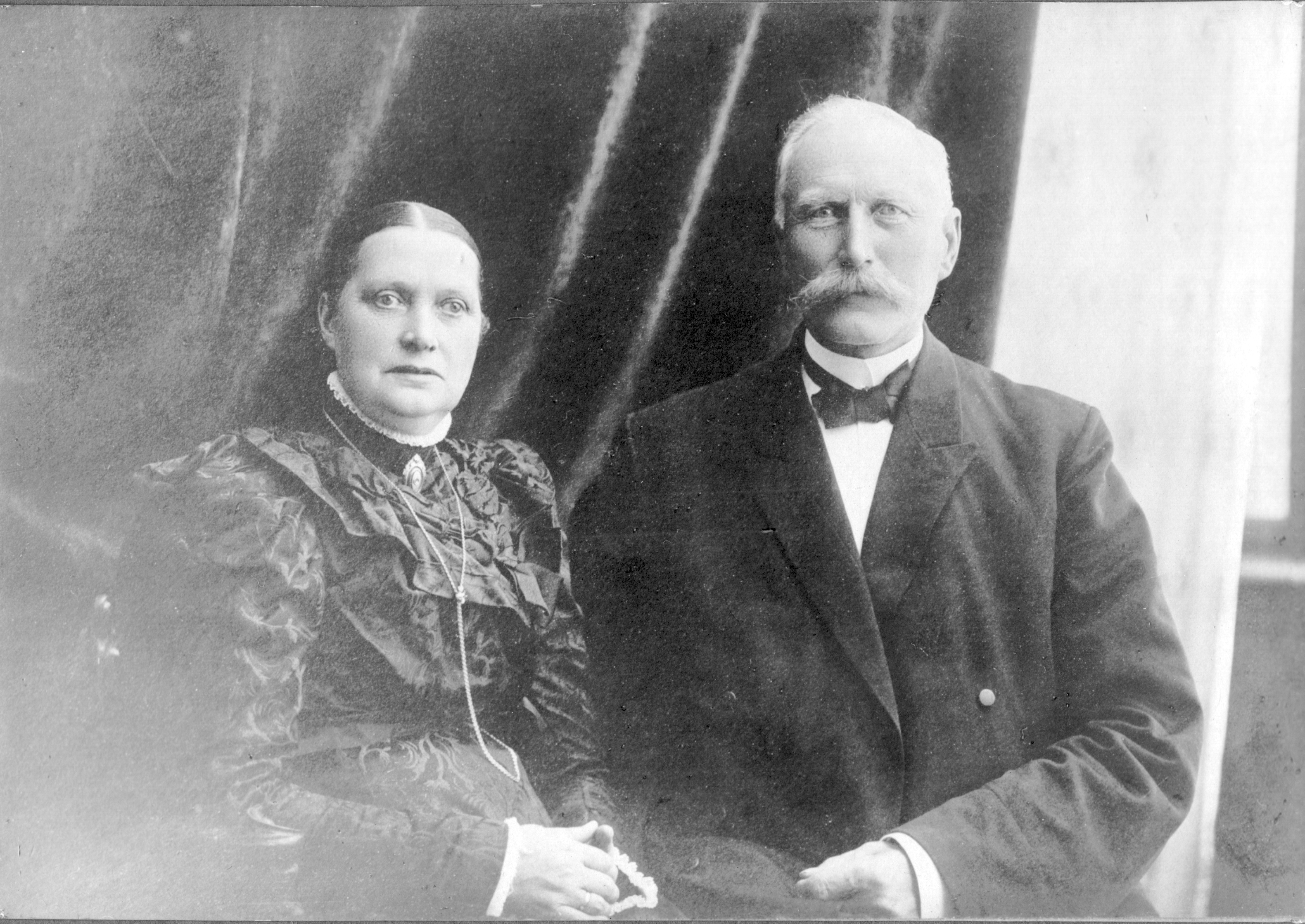 Mette Gunnarsdatter (Skatval) Wæhre (f. 1855 i Skatval, d. 1934) og Ole Nikolai Olsen Wæhre (f. 1854 i Strinda, d. 1914). Bodde på Kjerk-Skatval (Skatval østre) i Skatval. Se Skatvalsboka 2, s. 75. Fotograf / Photographer: Edv. B. Østeraas, Stjørdalen Fotoeier / Photo owner: Anne-Marie og Hermann Moe Digitalisering / Digitizing: Arne Langås Foto-ID / Photo ID: 003-0033 Har du utfyllende opplysninger? Legg gjerne igjen en kommentar nedenfor eller send e-post til . | Do you have additional information? Please leave a comment below or send an e-mail to .